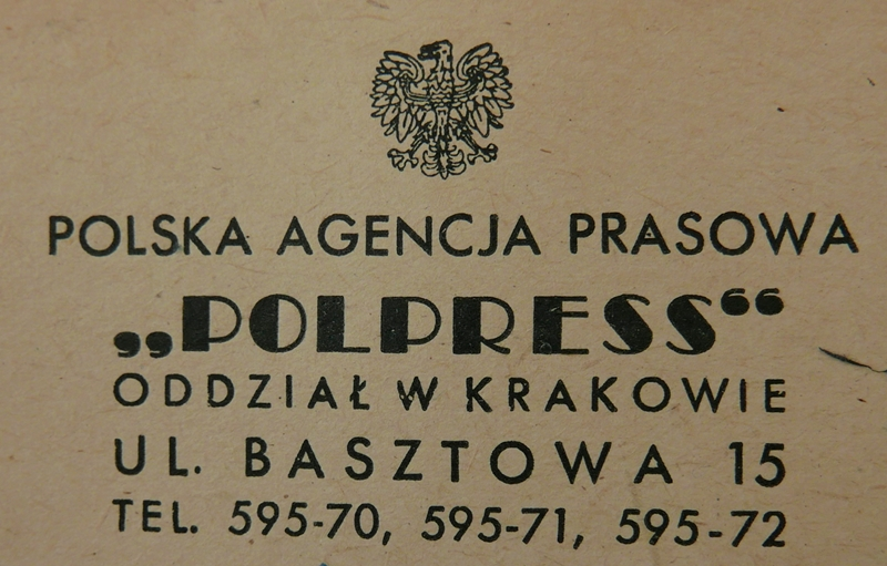 Polpress Polska Agencja Prasowa. Fotografia logo z papieru firmowego z 1945